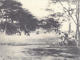 沖縄県国頭郡今帰仁村・仲原馬場で開催された琉球競馬の模様